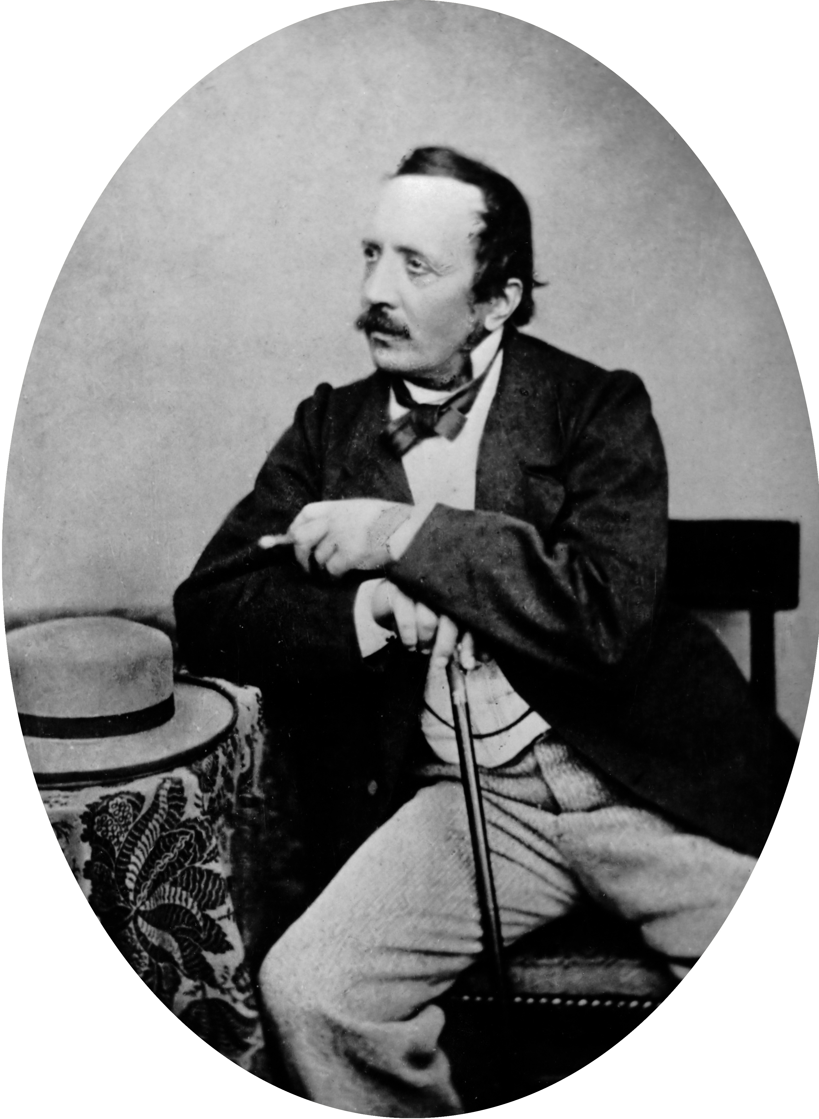 Professor Johan Joseph Hoffman (1805-1878), japanoloog.